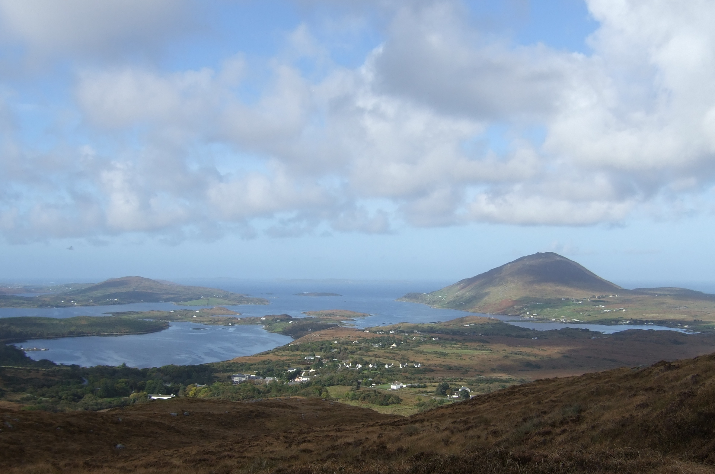 Letterfrack, Connemara - Ireland